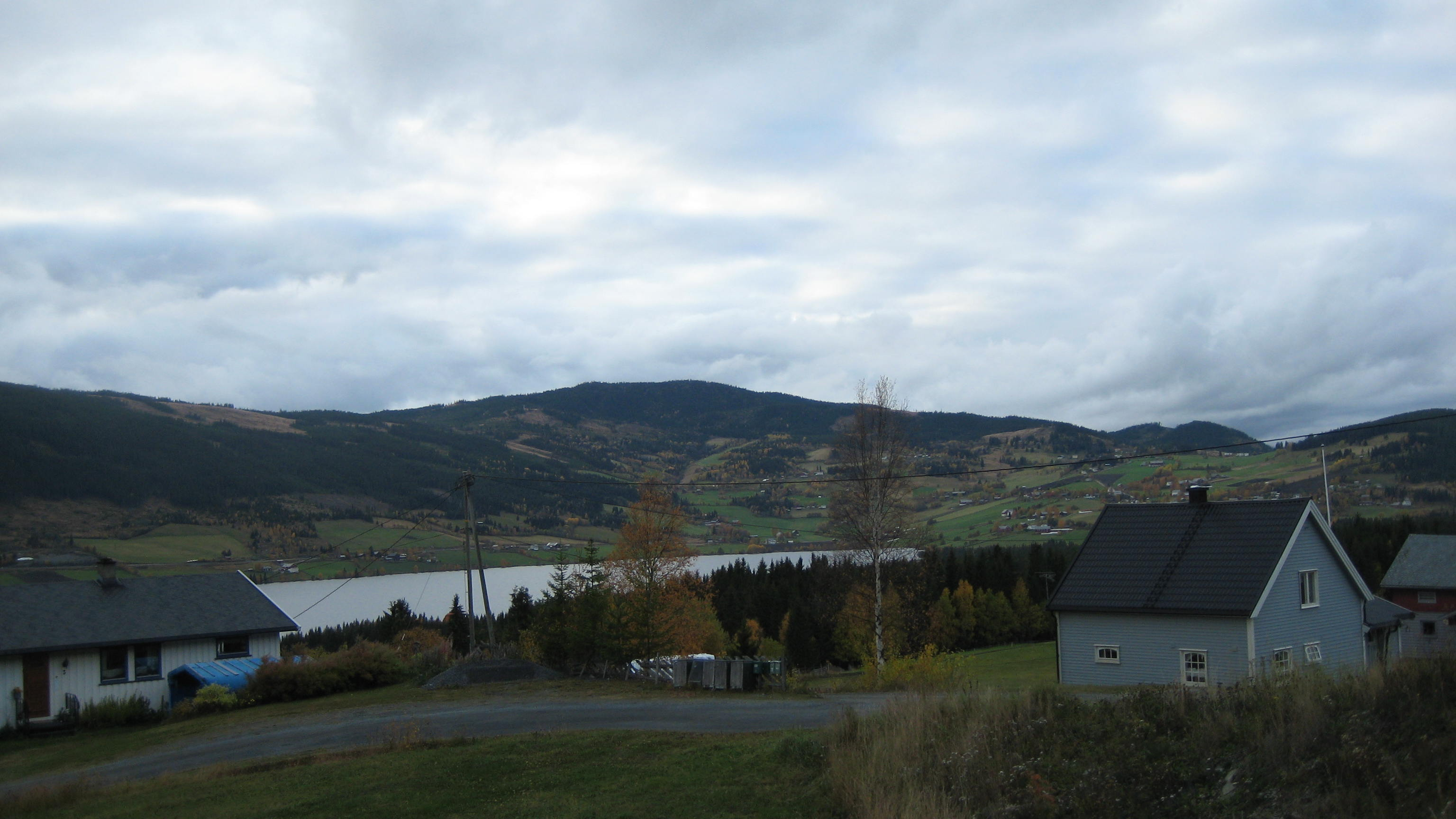 Volbufjorden ved Volbu